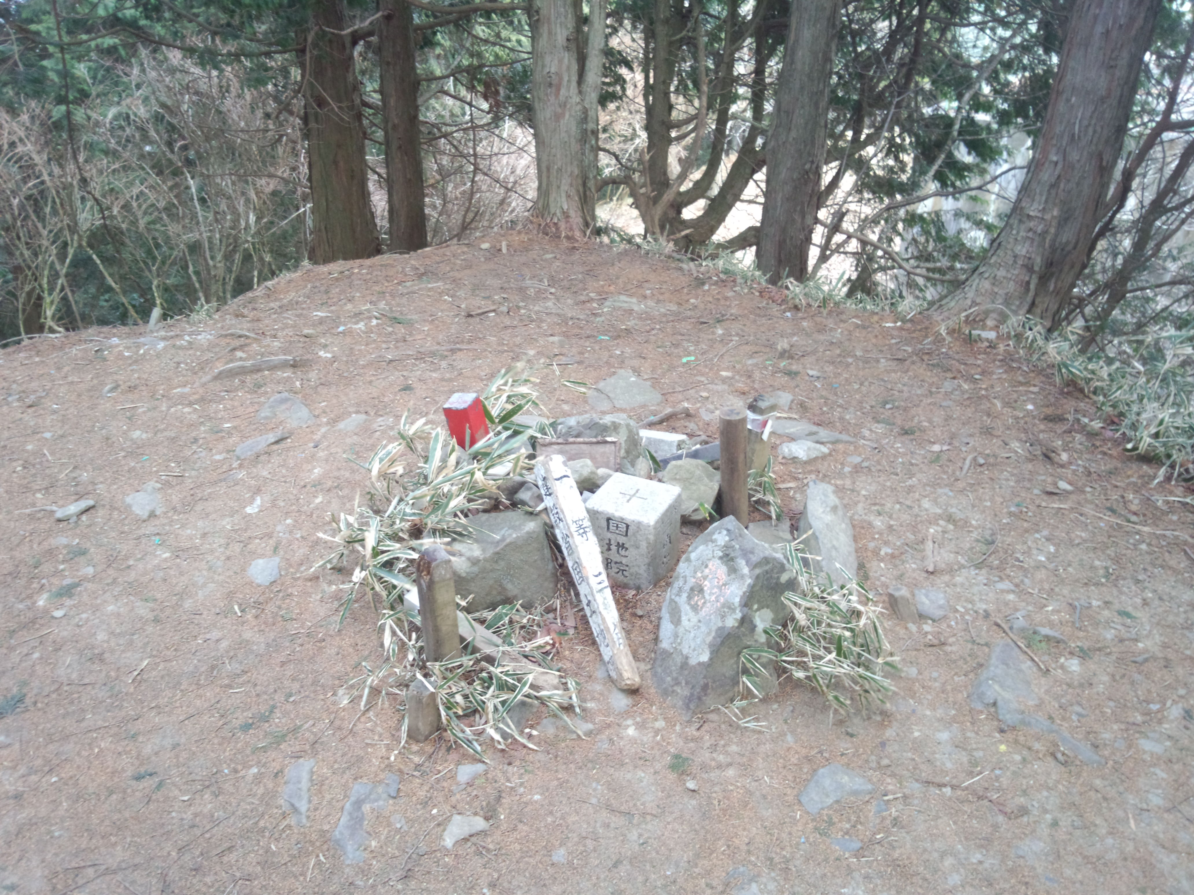 比叡山山頂（大比叡）に設置された一等三角点である。